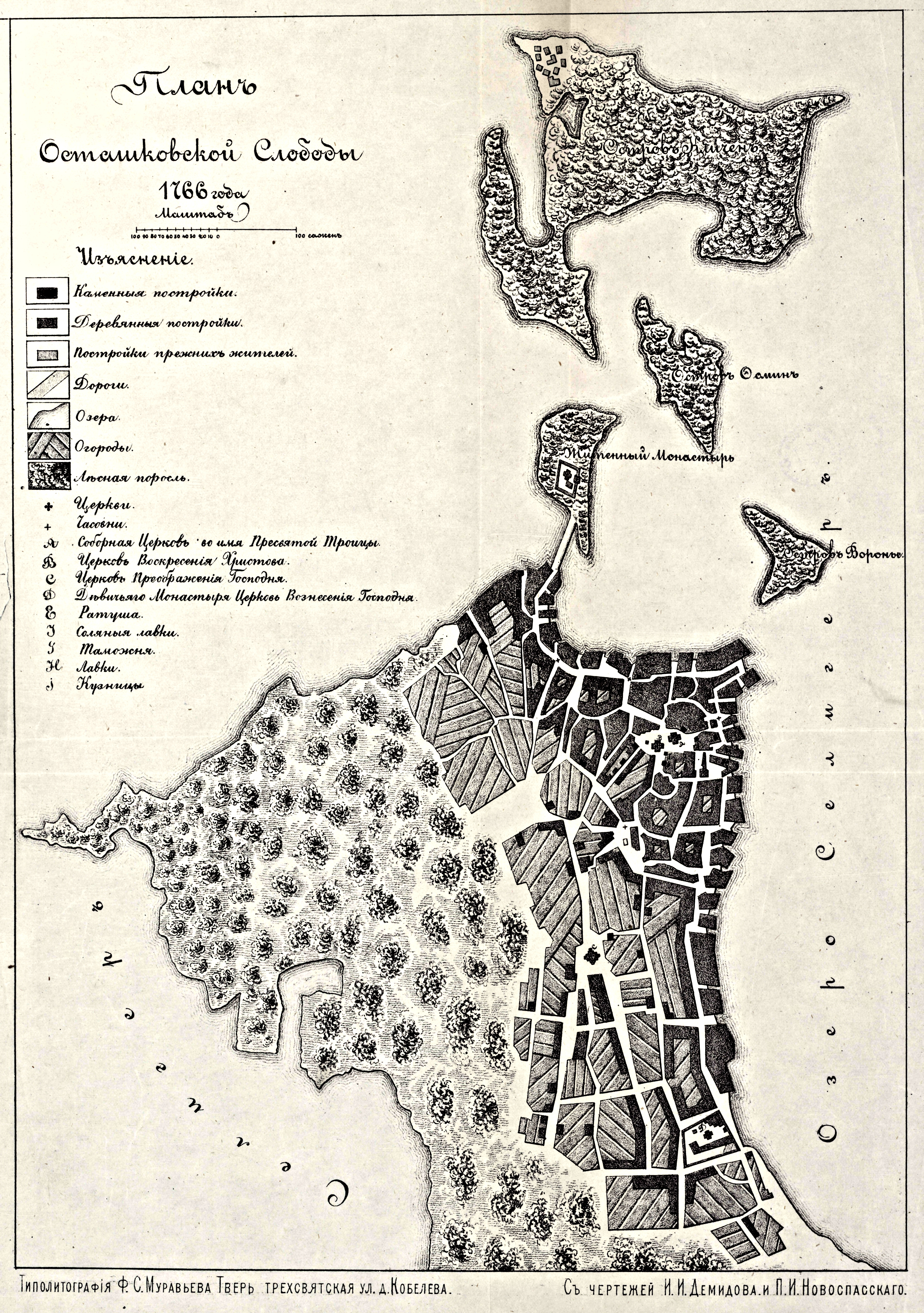 План Осташковской слободы в 1766 году с чертежей Н. И. Демидова и П. И. Новоспасского. "Историко-статистическое описание города Осташкова"/Сост. и предисл. В.И. Покровского - Тверь:тип. Губ. зем. управы, 1880